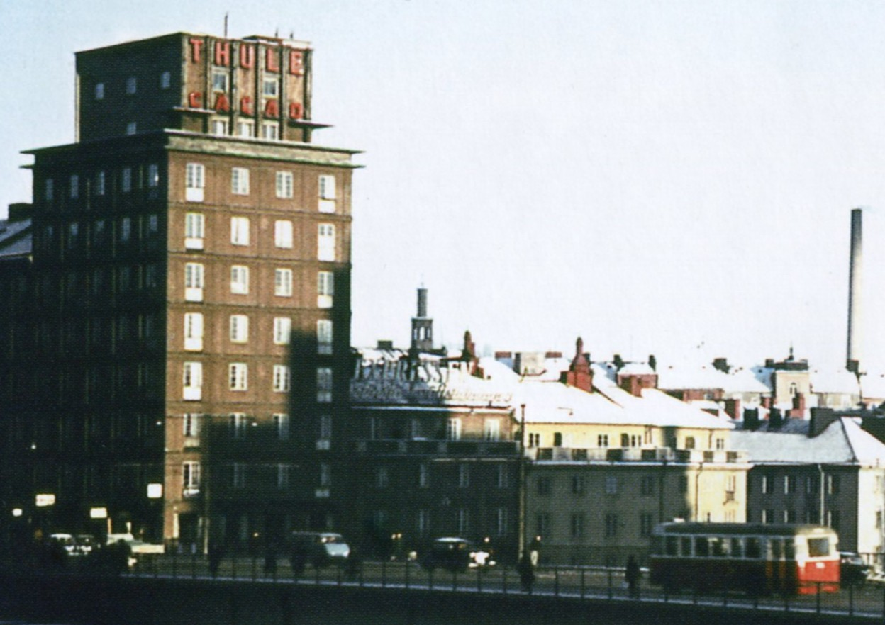 Byggnaden Sankt Eriksgatan 64, med Tulo-raklam, Stockholm